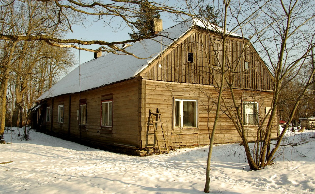 asub Harjumaal Saku vallas